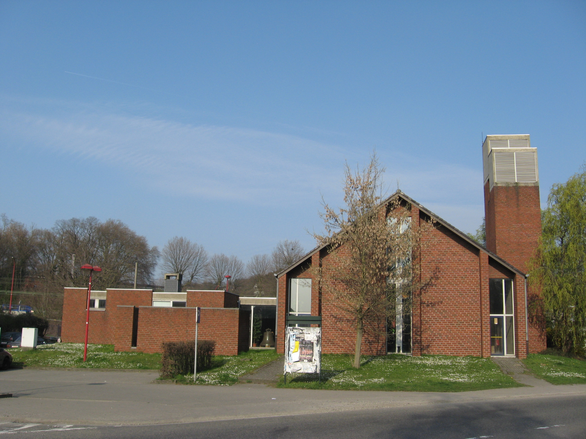 Sint-Hubertuskerk te Tilleur, Saint-Nicolas